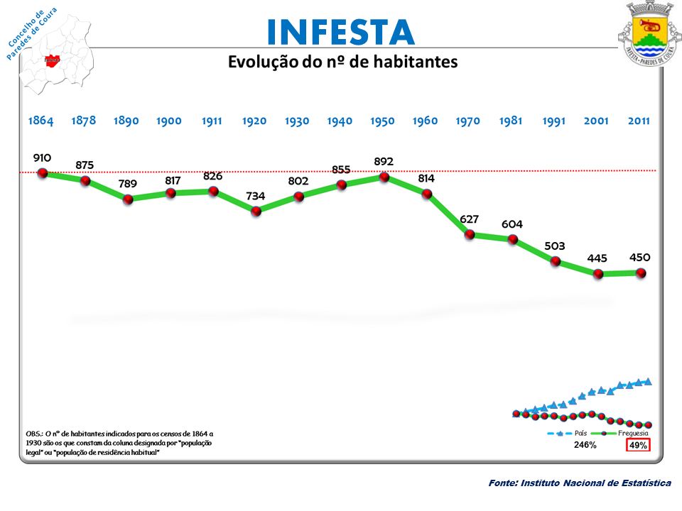 Censos 1864/2011